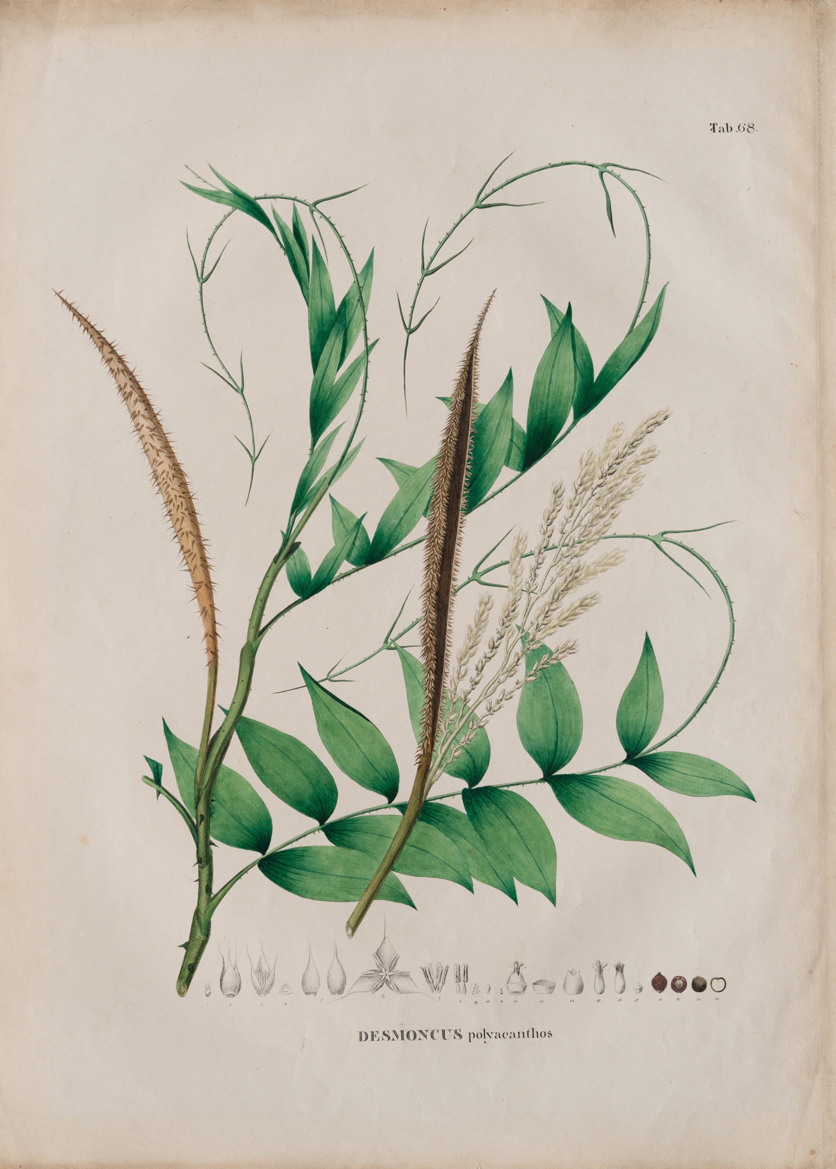 Obra da coleção Brasiliana Iconográfica.